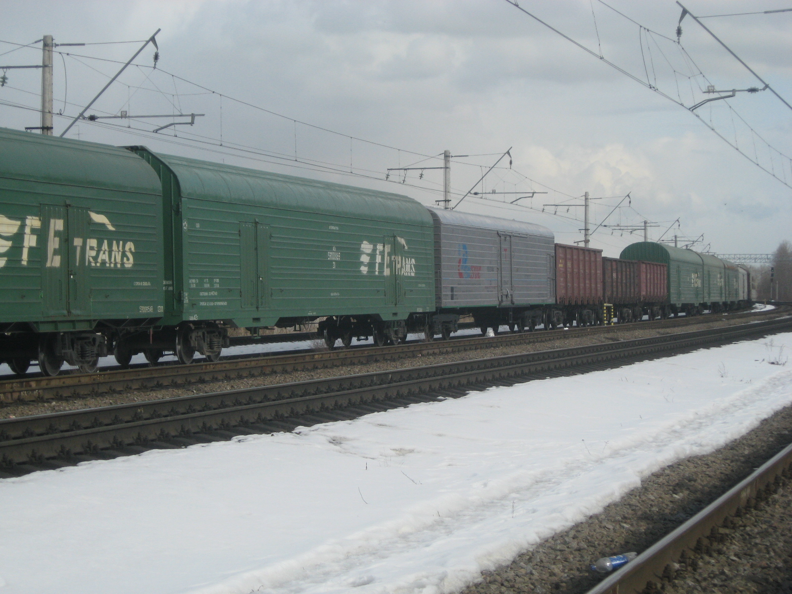 ж/д состав на станции Лигово